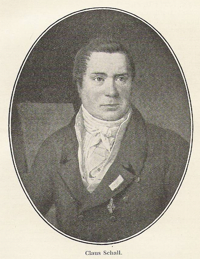 Billede af komponisten og dirigenten Claus Schall Malet af Eckersberg 1824